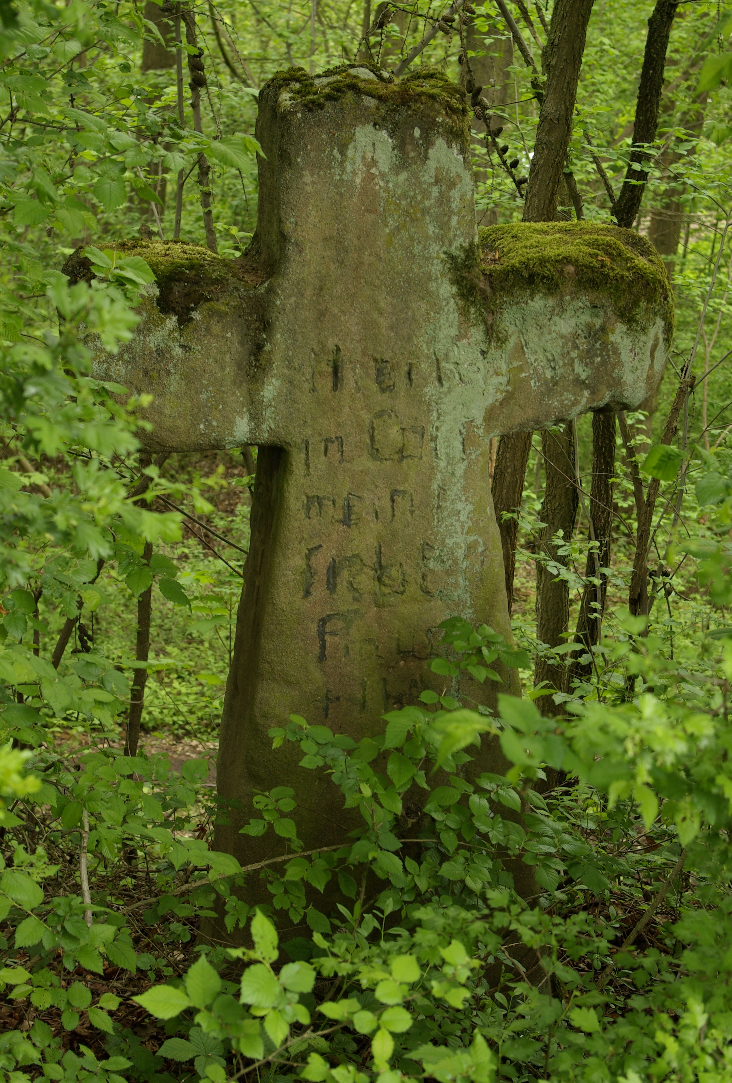 Steinkreuz im Erlanger Stadtteil Frauenaurach am alten Weg nach Kriegenbrunn